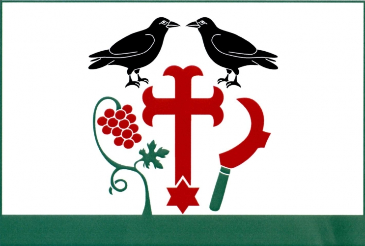 vlajka,Havraníky , okres Znojmo